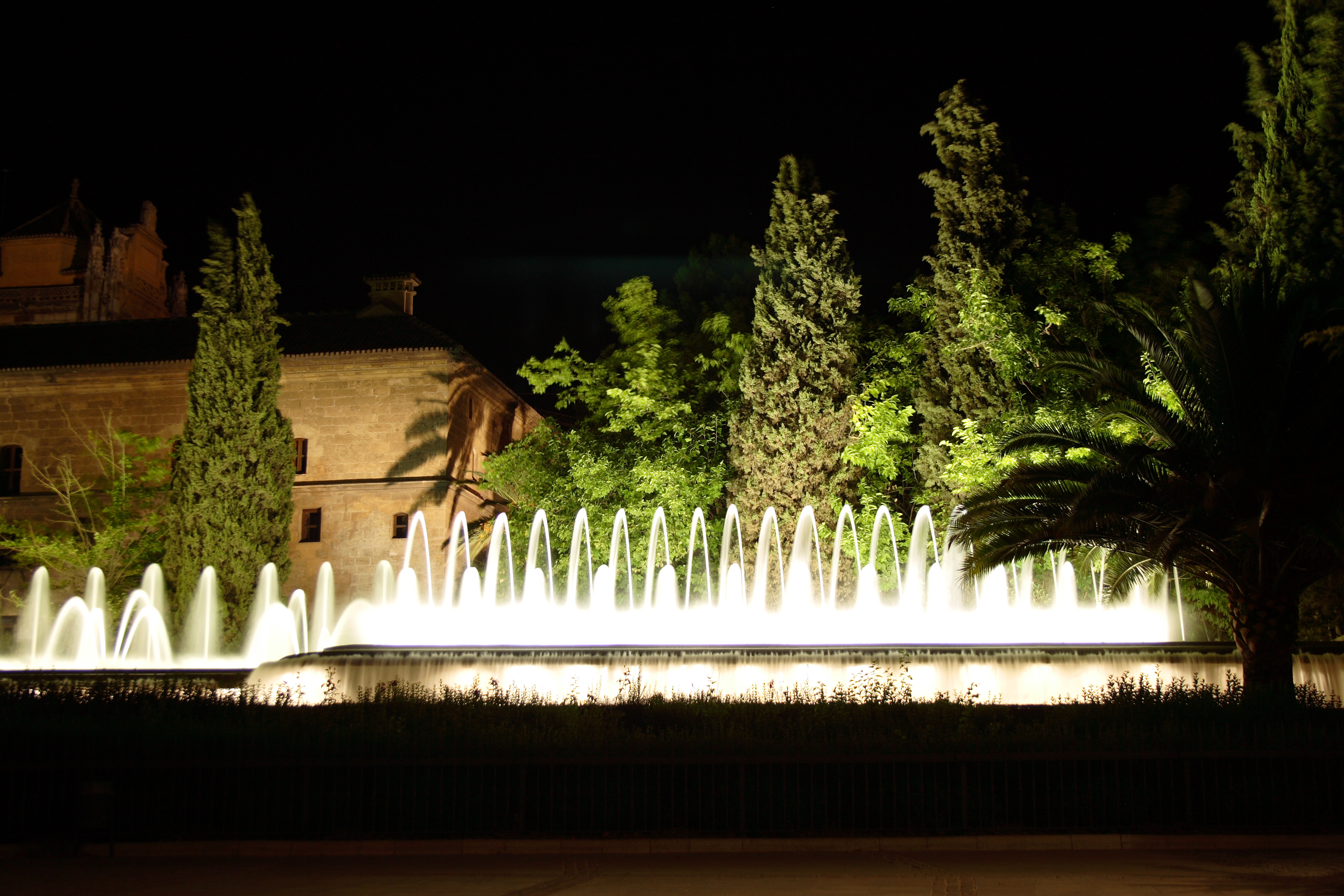 Fuente de El Triunfo de noche, Granada, España